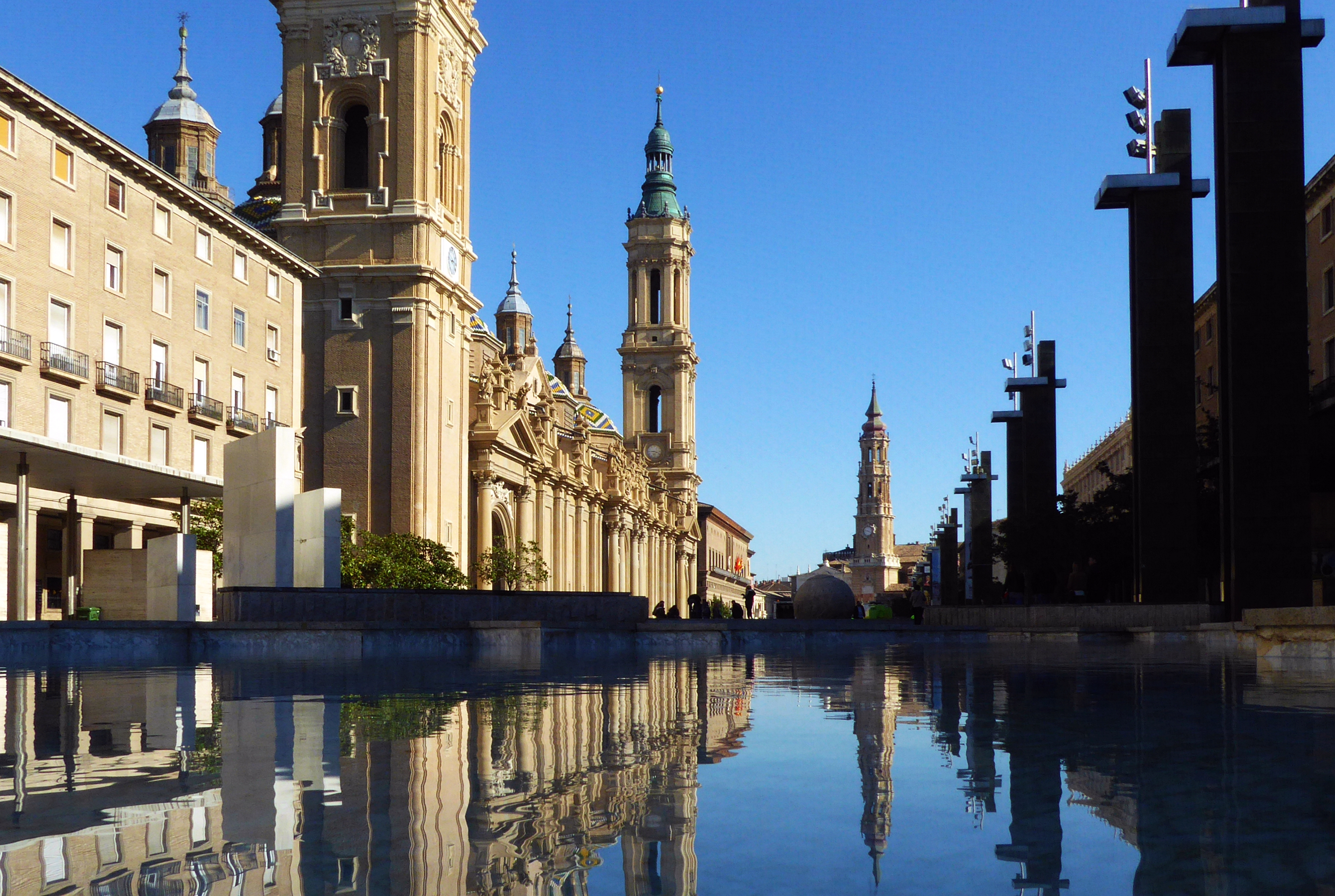 Plaza del Pilar vor Basílica de Nuestra Señora del Pilar Rathaus Cathedr del Salvador Zaragoza Aragon Spanien Foto Wolfgang Pehlemann P1150538